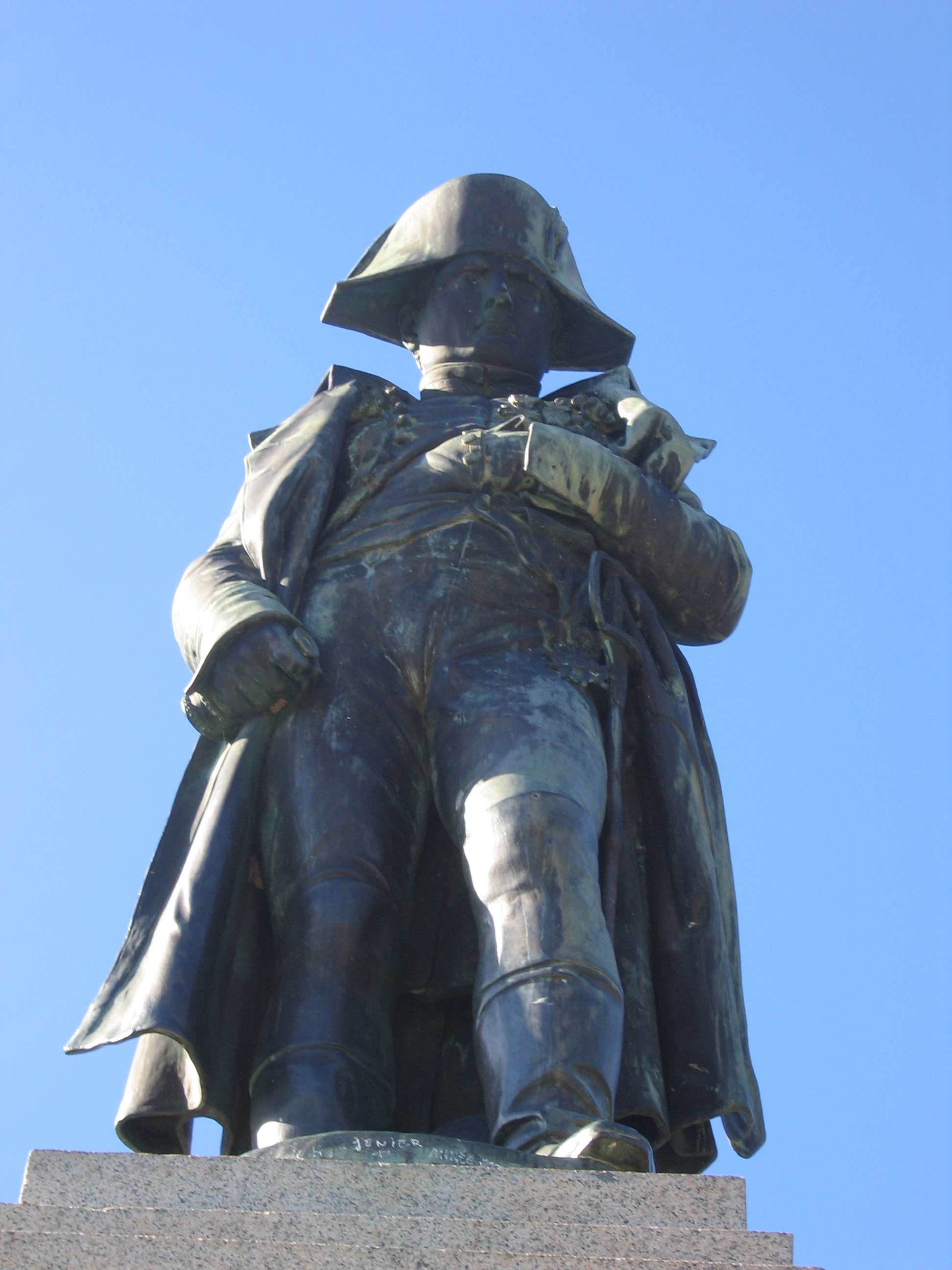 D'après Charles Emile Seurre: Napoléon caporal, statue en pied, bronze inauguré en 1938 (l'original a été érigé en 1833 à l'Hôtel des Invalides à Paris), Place d'Austerlitz, Ajaccio (Corse-du-Sud, France)